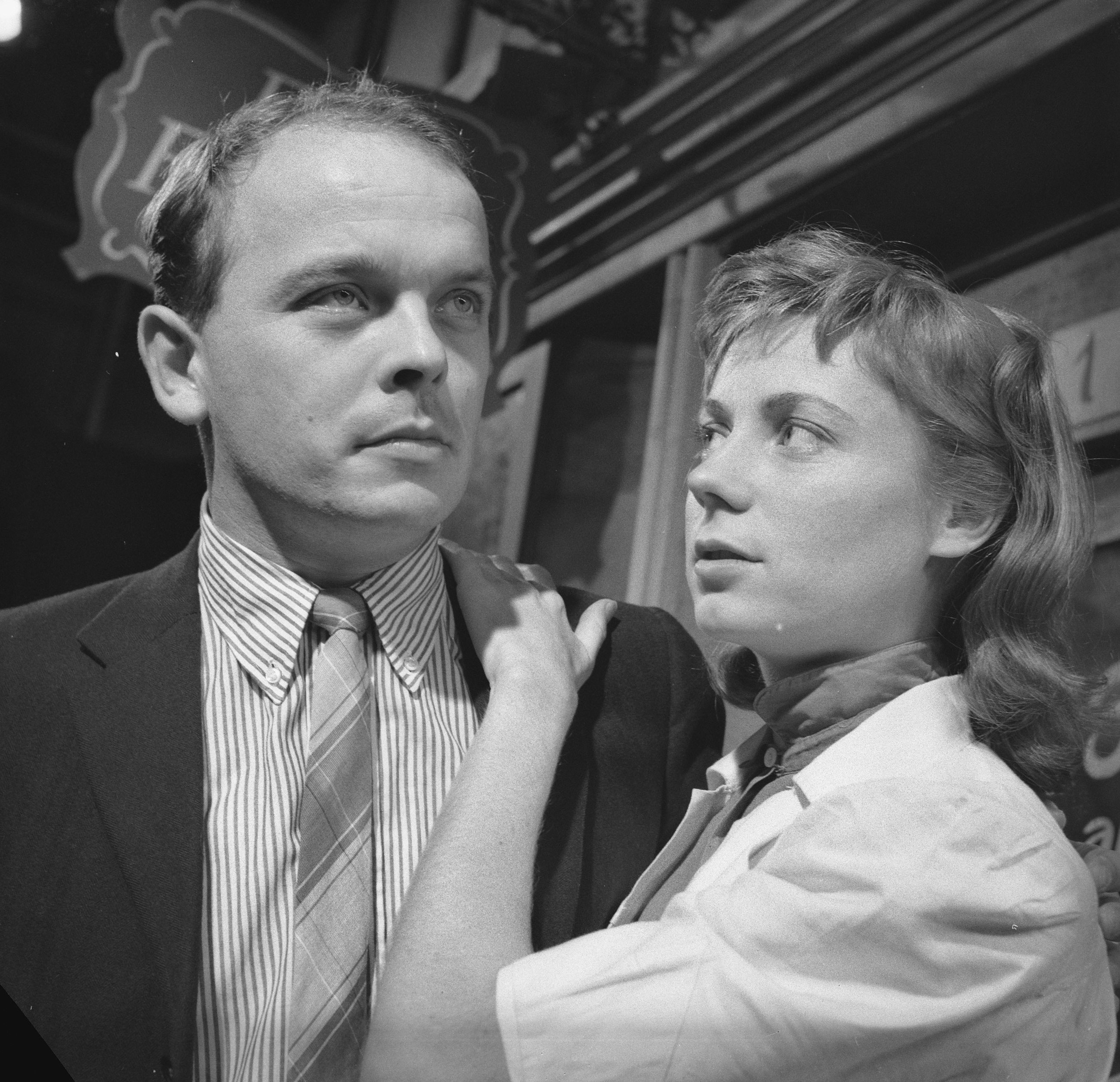 AVRO-Televisiespel "De Ooggetuige". Ingeborg Elzevier en Piet Kamerman